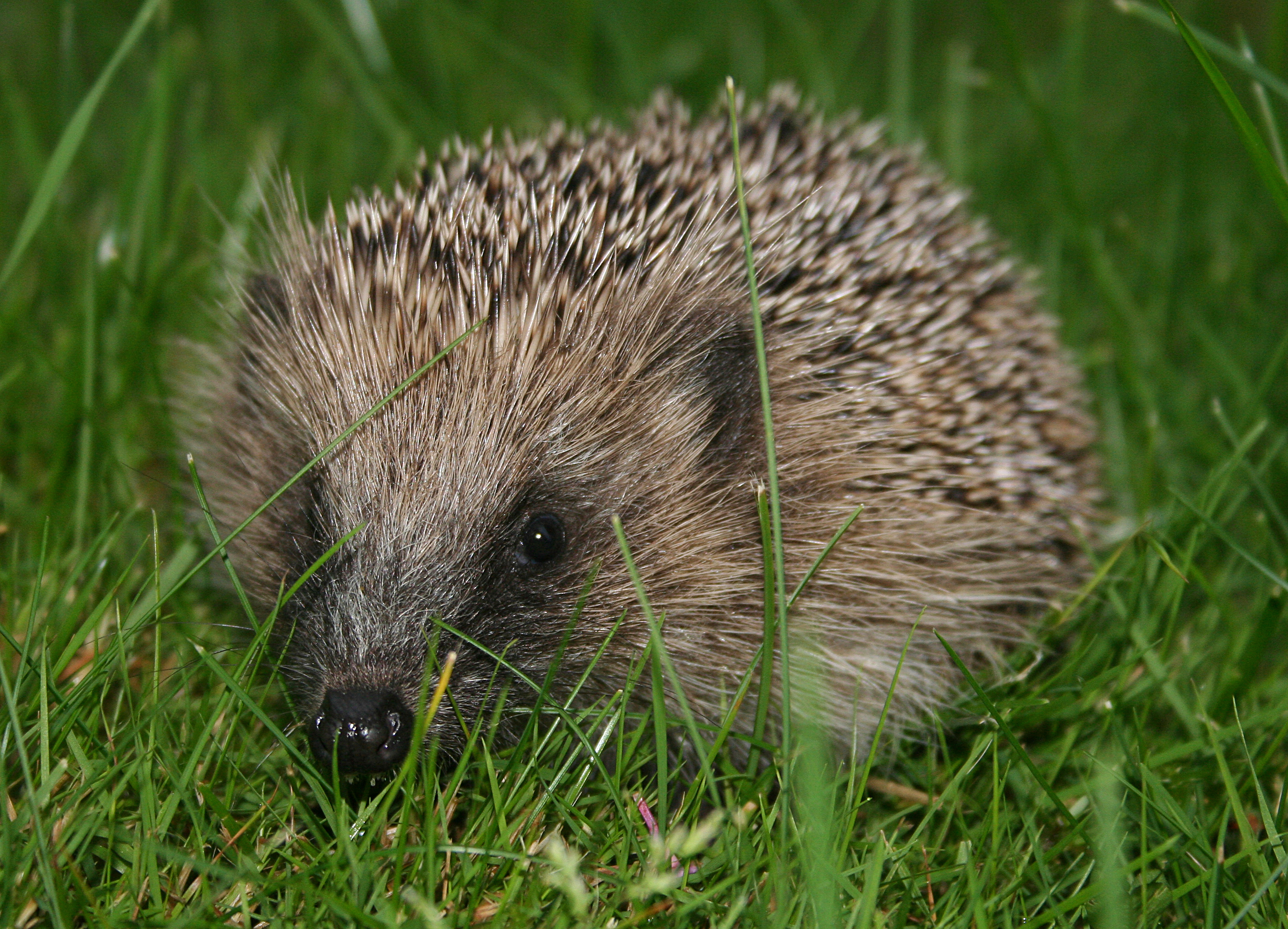 European hedgehog (Erinaceus_europaeus)